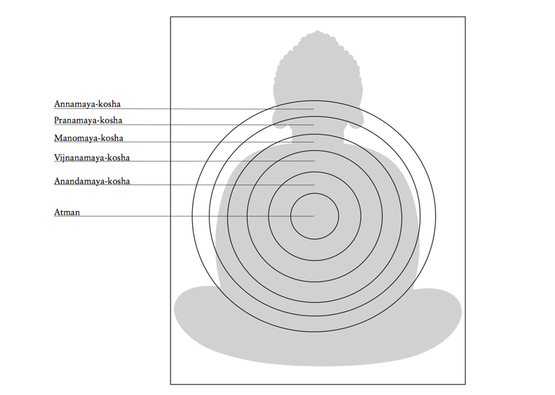 Illustrasjon av de fem koshaene